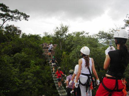 Reserva Mbatovi, Ruta Paraguarí-Piribebuy, Paraguay